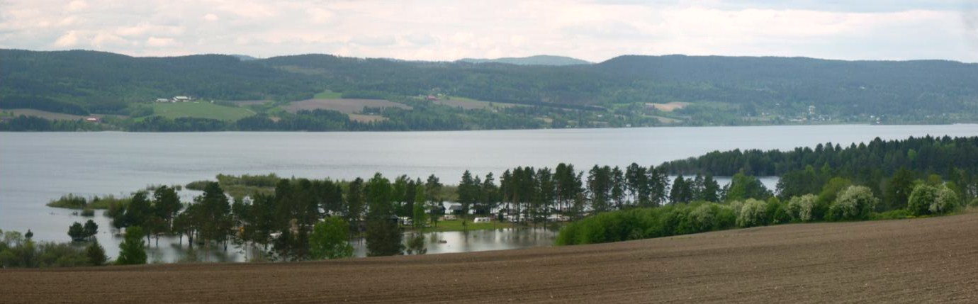 Storelvas utløp til Nordfjorden (del av Tyrifjorden). Holleia i bakgrunnen.